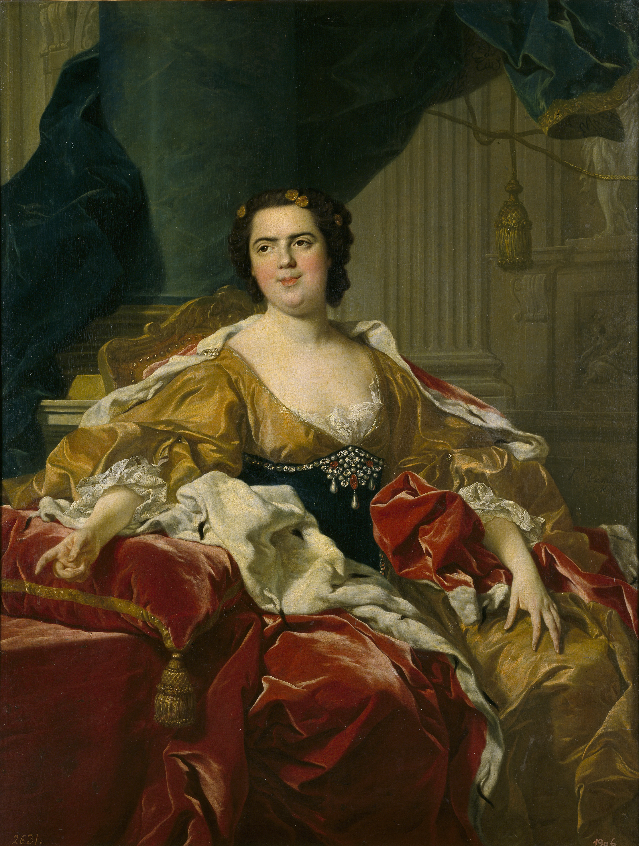 Retrato de la princesa francesa Luisa Isabel de Francia (1727-1759), que fue hija del rey Luis XV de Francia y de la reina María Leszczyńska y esposa del infante Felipe I de Parma, duque de Parma e hijo del rey Felipe V de España.